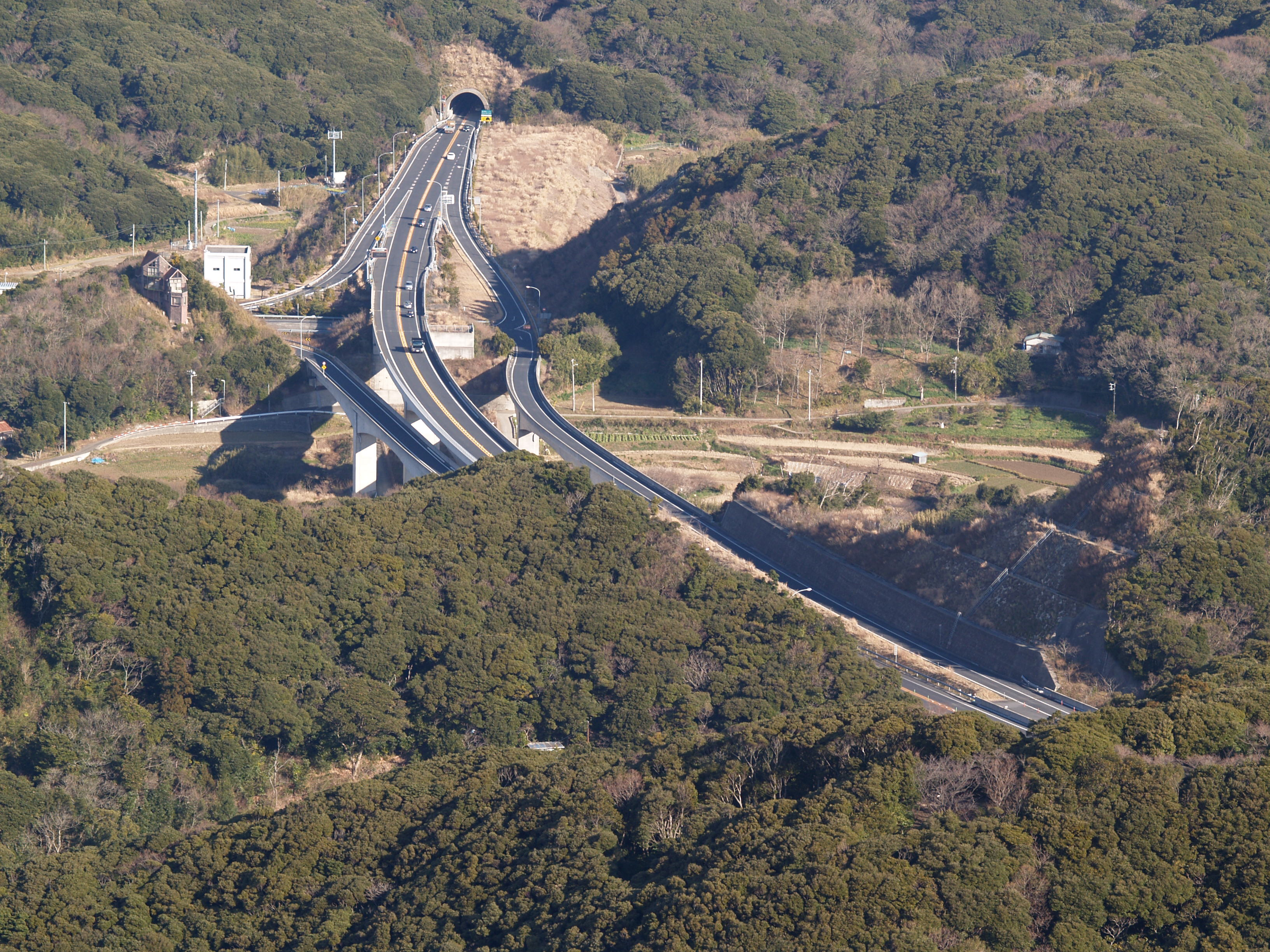 富津金谷インターチェンジ（鋸山山頂から撮影）